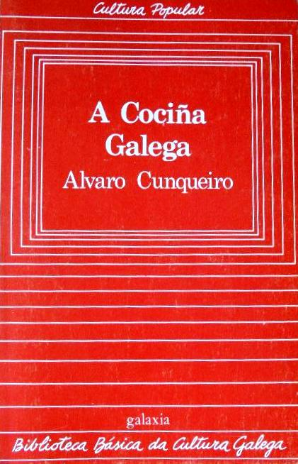 Biblioteca Básica da Cultura Galega, 21, A cociña galega, Álvaro Cunqueiro